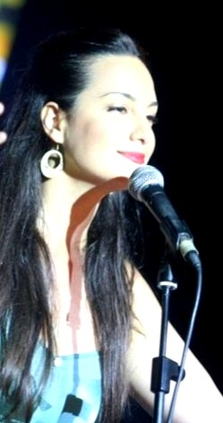 Adi Arad singing